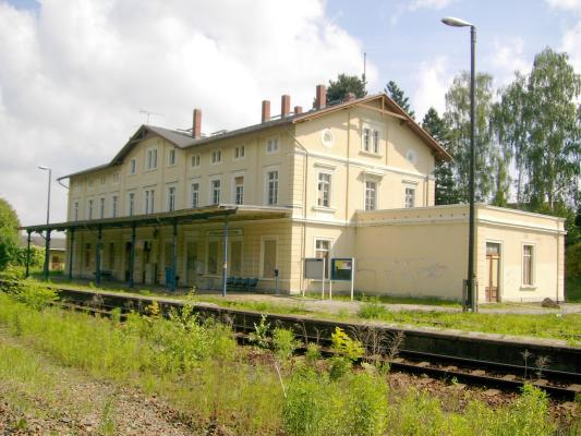 Bahnhof Schirgiswalde-Kirschau selbst erstellt und auf veröffentlicht